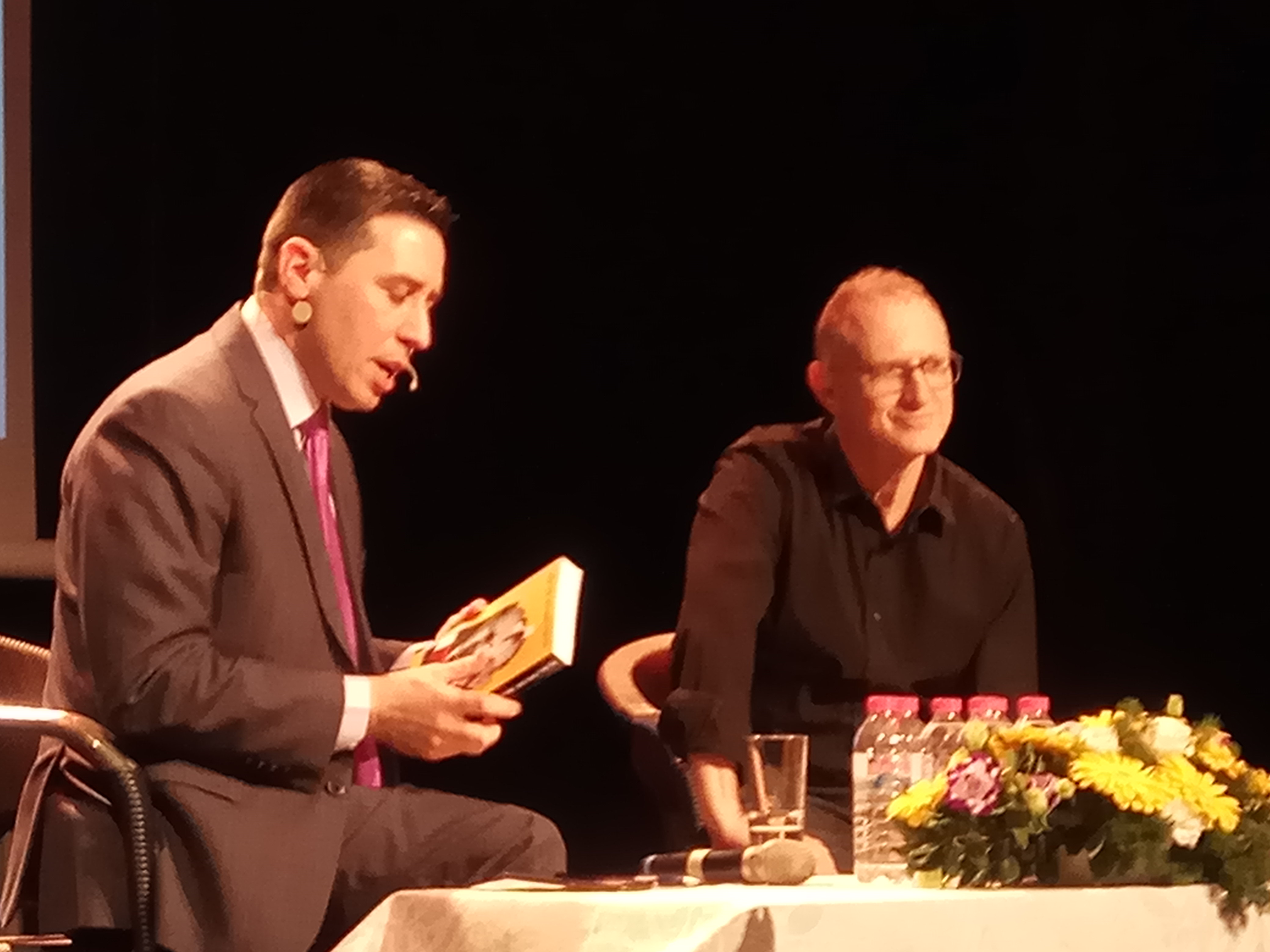 אטילה שומפלבי מראיין את משה גאון